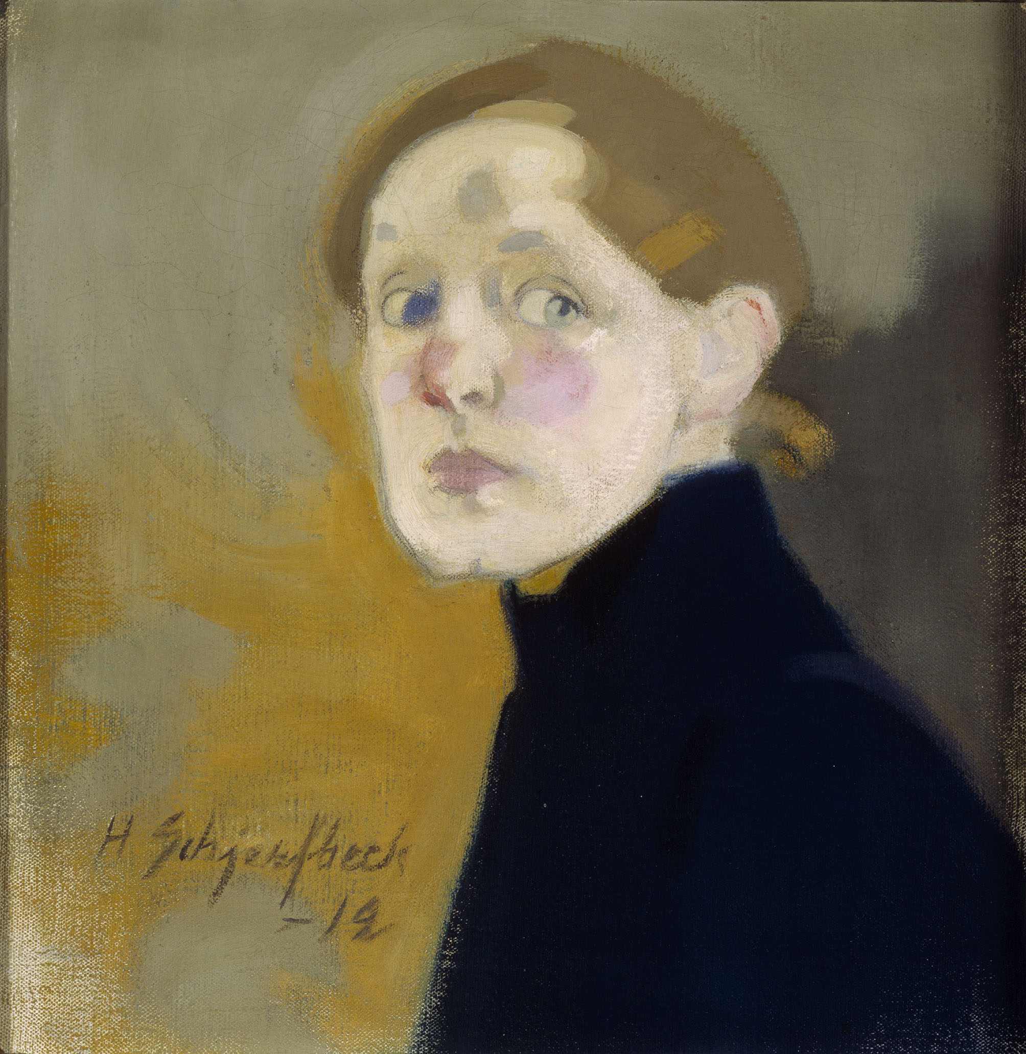 taiteilija: Schjerfbeck, Helene Inventaarionro TA-2005-6 teosnimi: Omakuva haltija: AT ajoitus: 1912 fi: öljy kankaalle pääluokka: maalaus mitat: 43,5 cm x 42 cm Valokuvanro 29998.34 ajoitus: 1991 valokuvaaja: Aaltonen, Hannu valokuvatyyppi: LAAKADIA sisältökuvaus: 225 Digikuvanro G0067600 skannaus 2005-09-15 skannaaja: Mykkänen, Pirje digiluokitus: skannattu kuva digitointilaite: FlexTight kuvankäsittelyohjelmisto: Photoshop 7.0